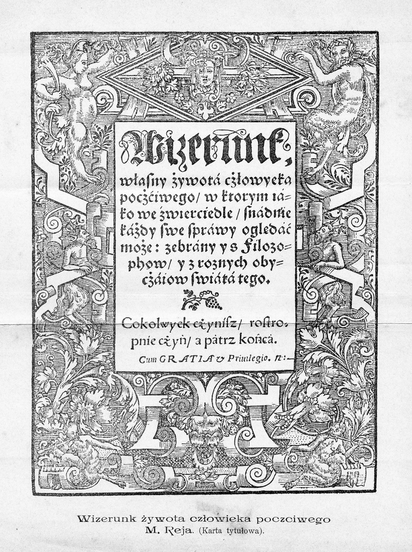 Wizerunek własny żywota człowieka poczciwego - karta tytułowa